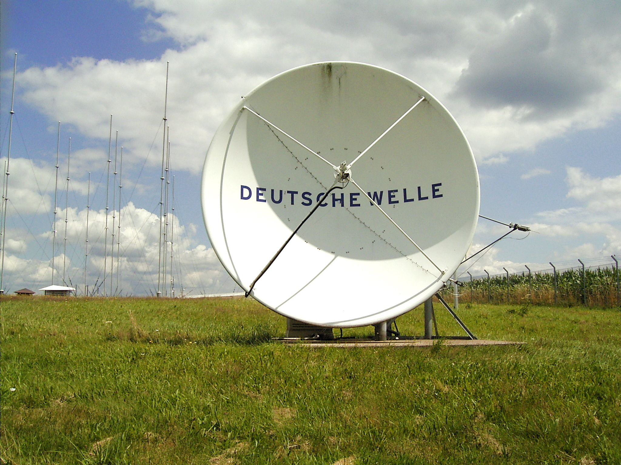 Deutsche Welle, Mess- und Empfangsstation in Hückeswagen-Bockhacken